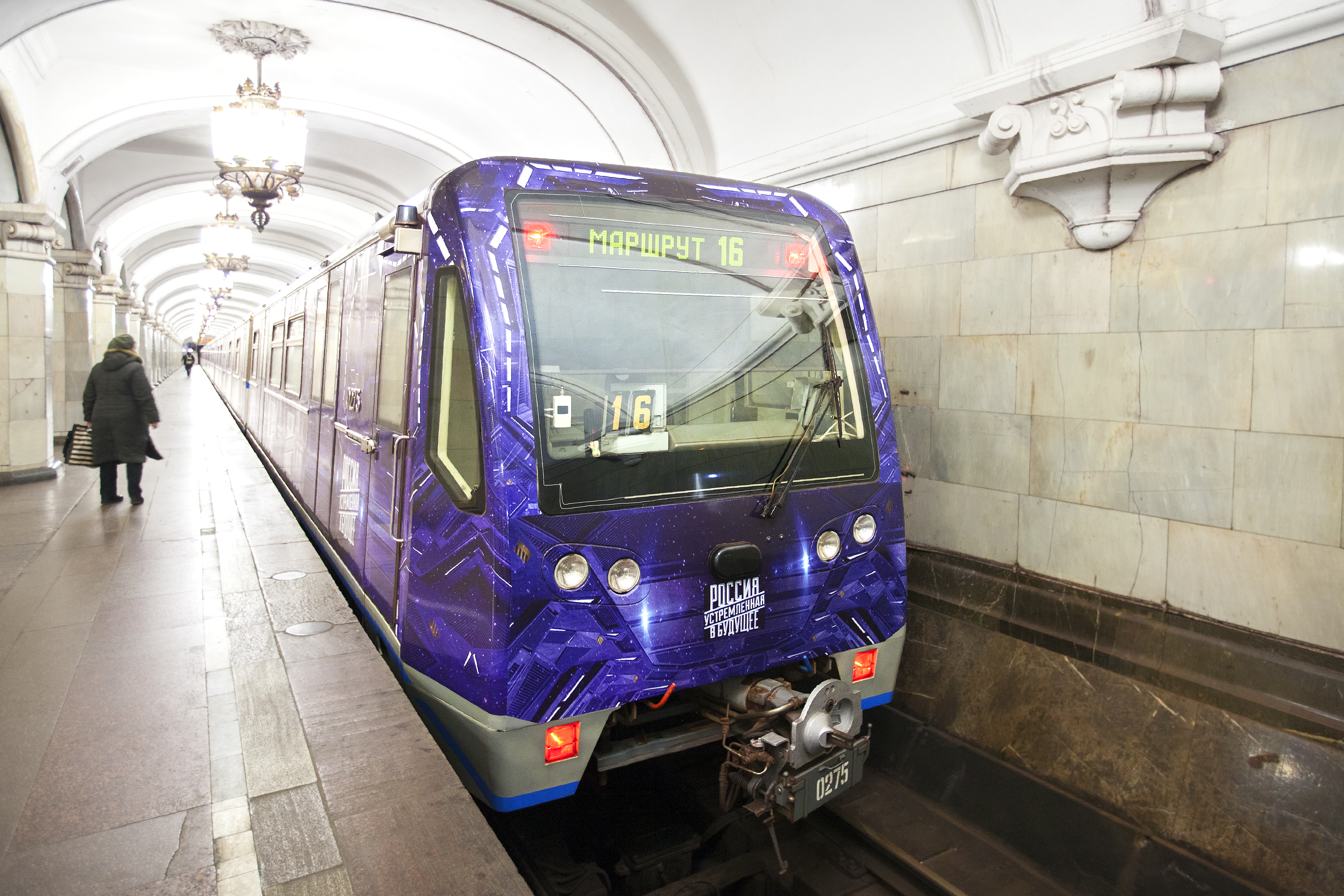 «Россия, устремлённая в будущее». Московский метрополитен